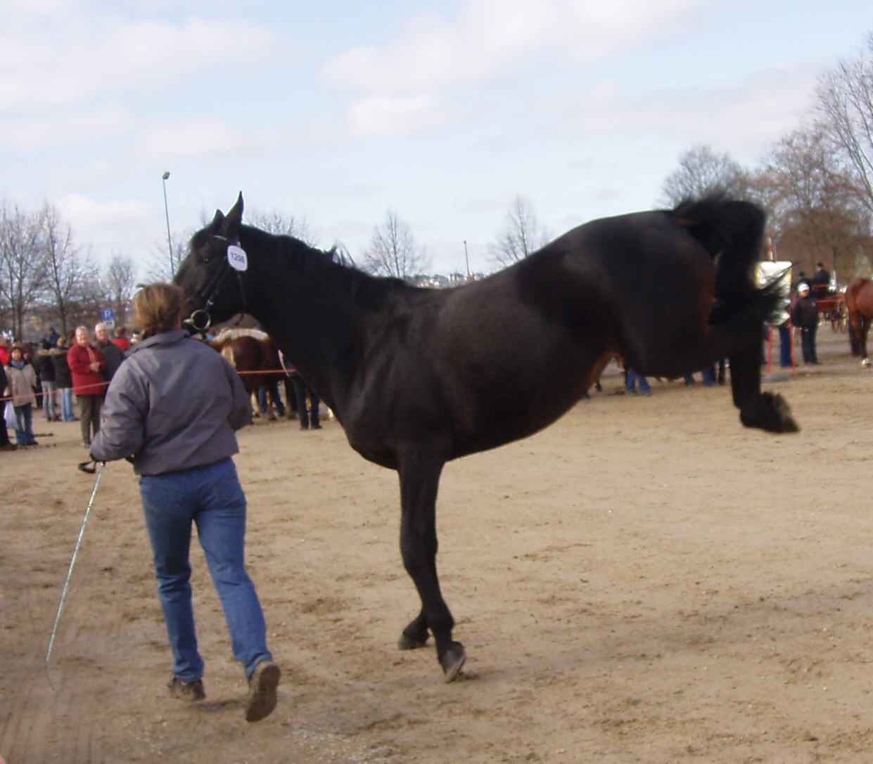 Ausschlagende Stute